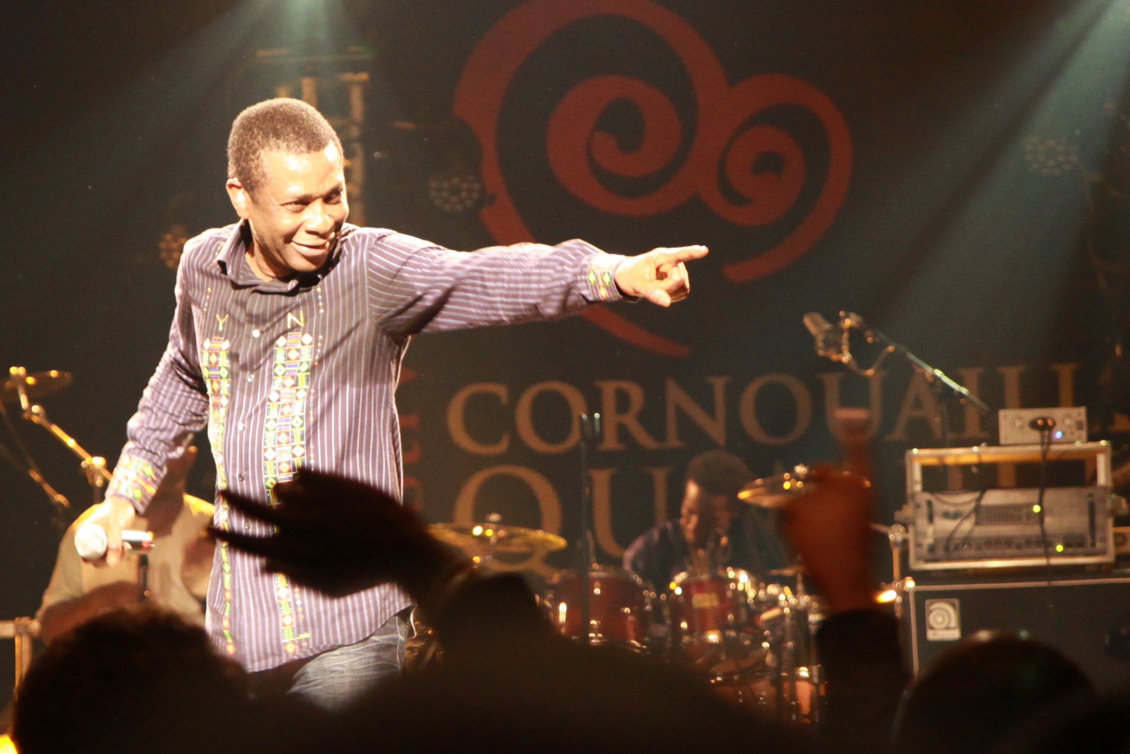 Youssou N'Dour en concert au festival de Cornouaille de Quimper le 25 juillet 2010 à l'espace Gradlon.